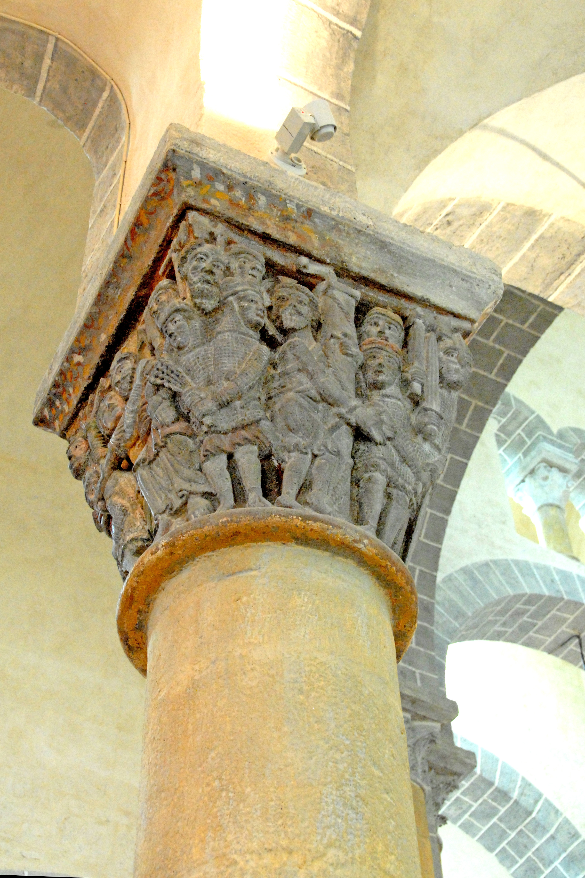 St.-Nectaire, Chorkapitell A, Seiten 1+2